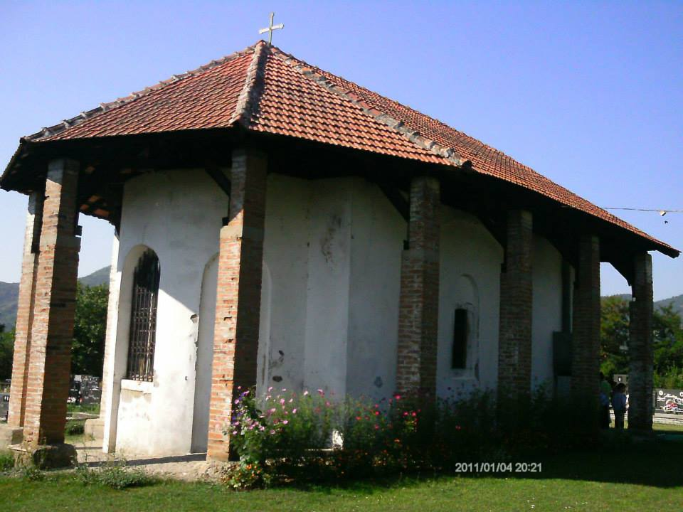 Црква Св. Николе у Баљевцу